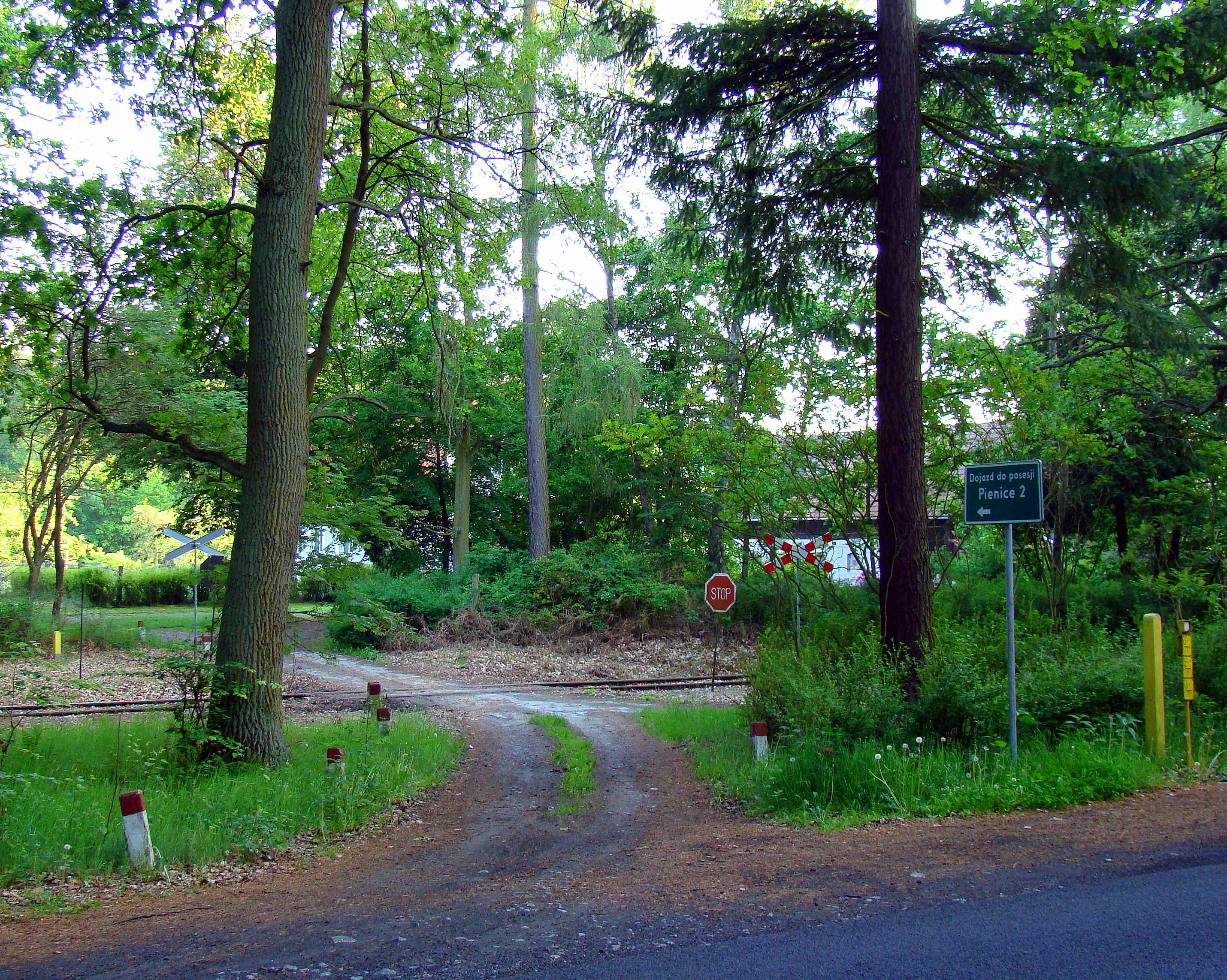 Pienice, Puszcza Wkrzańska, (Powiat policki, Województwo zachodniopomorskie), Polska